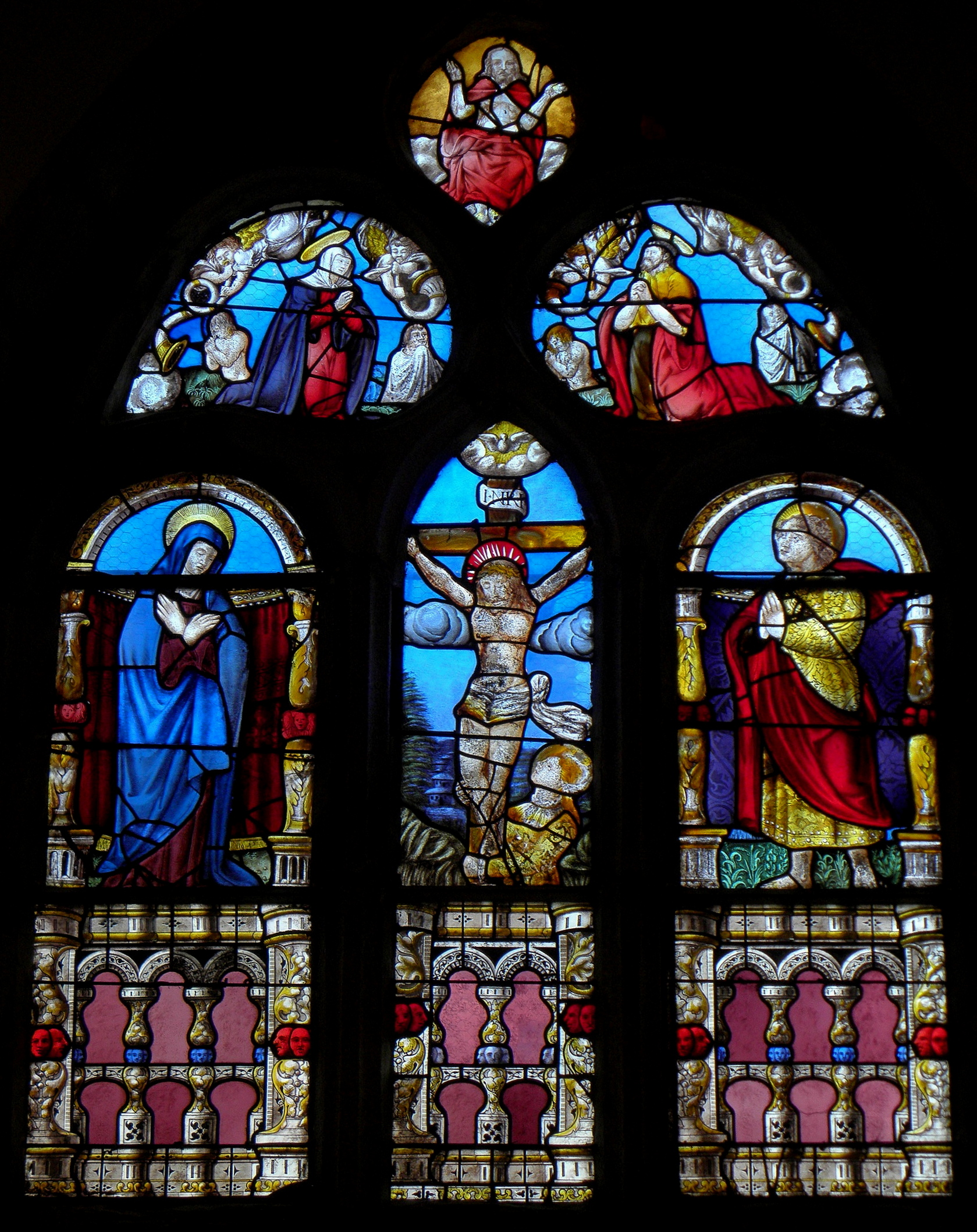 Maîtresse vitre de la chapelle Saint-Lubin de Plémet (22). Localisation: baie 00 de la chapelle Saint-Lubin de Plémet (22). Datation: XVIème siècle. Description: Crucifixion et Résurrection des morts.. Classement: 30/12/1926.